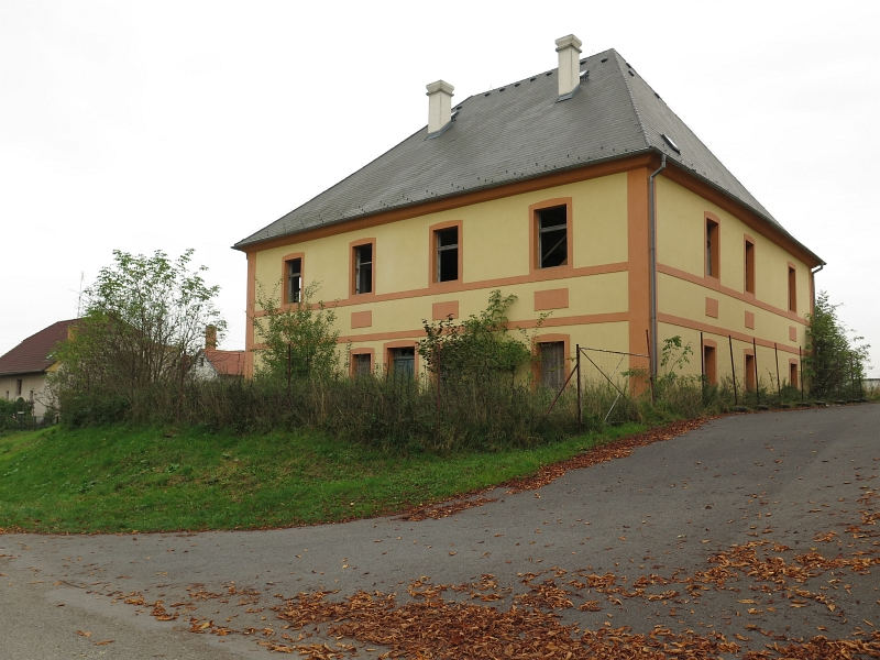 Zámeček Hřebečníky, Hřebečníky 1, Hřebečníky.